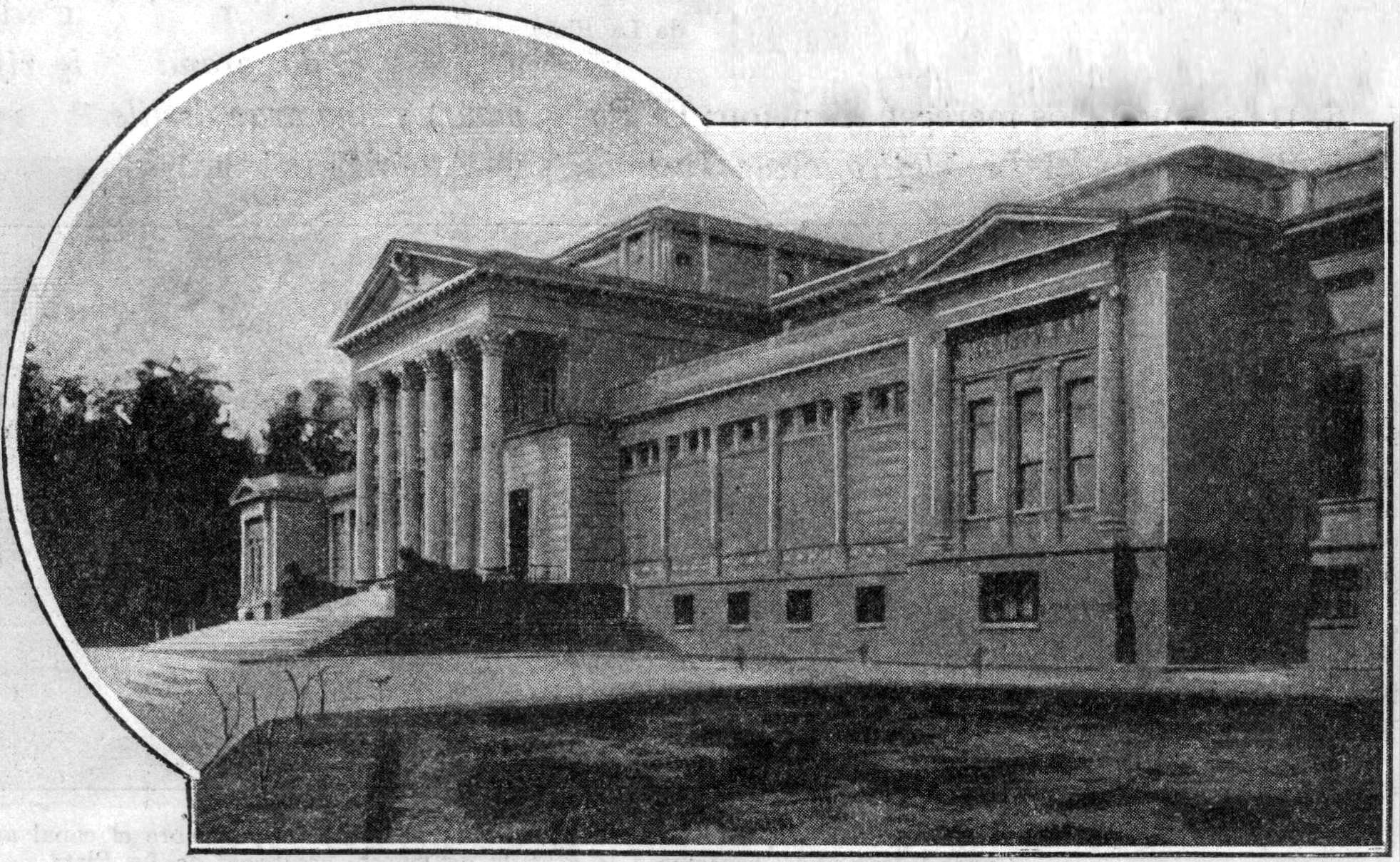 Fachada del Museo de Ciencias Naturales de la Plata en una fotografía de la década de 1930